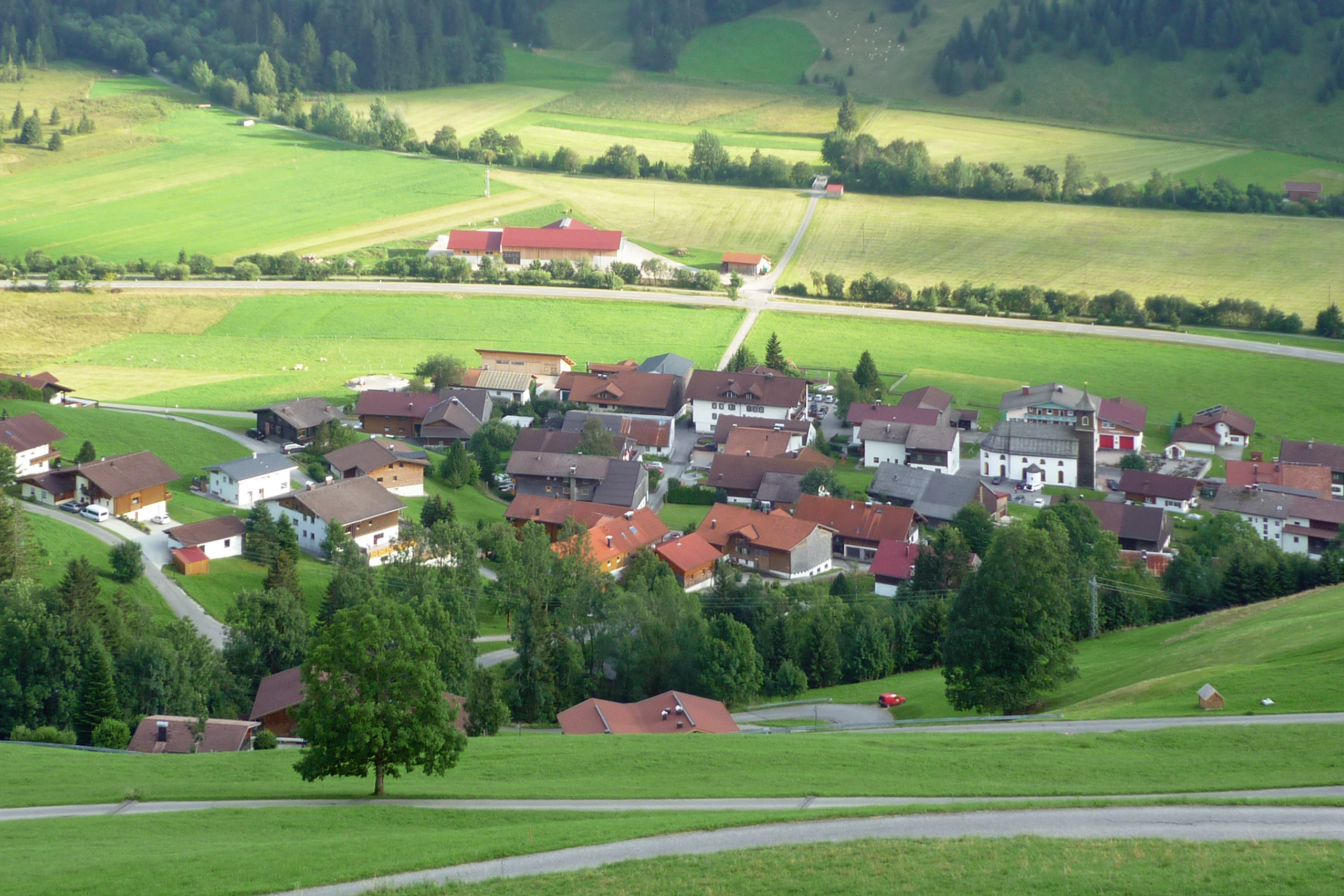 Blick von der Oberen Halde auf Zöblen (Tannheimer Tal)